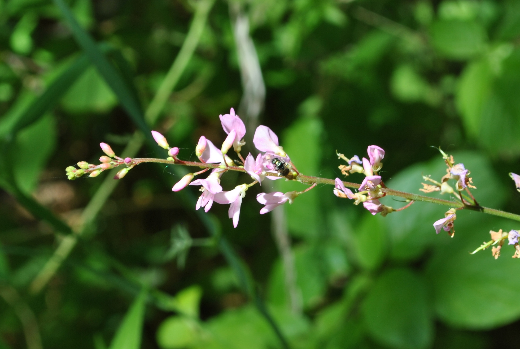 Menomin Park, Menomonie, WI